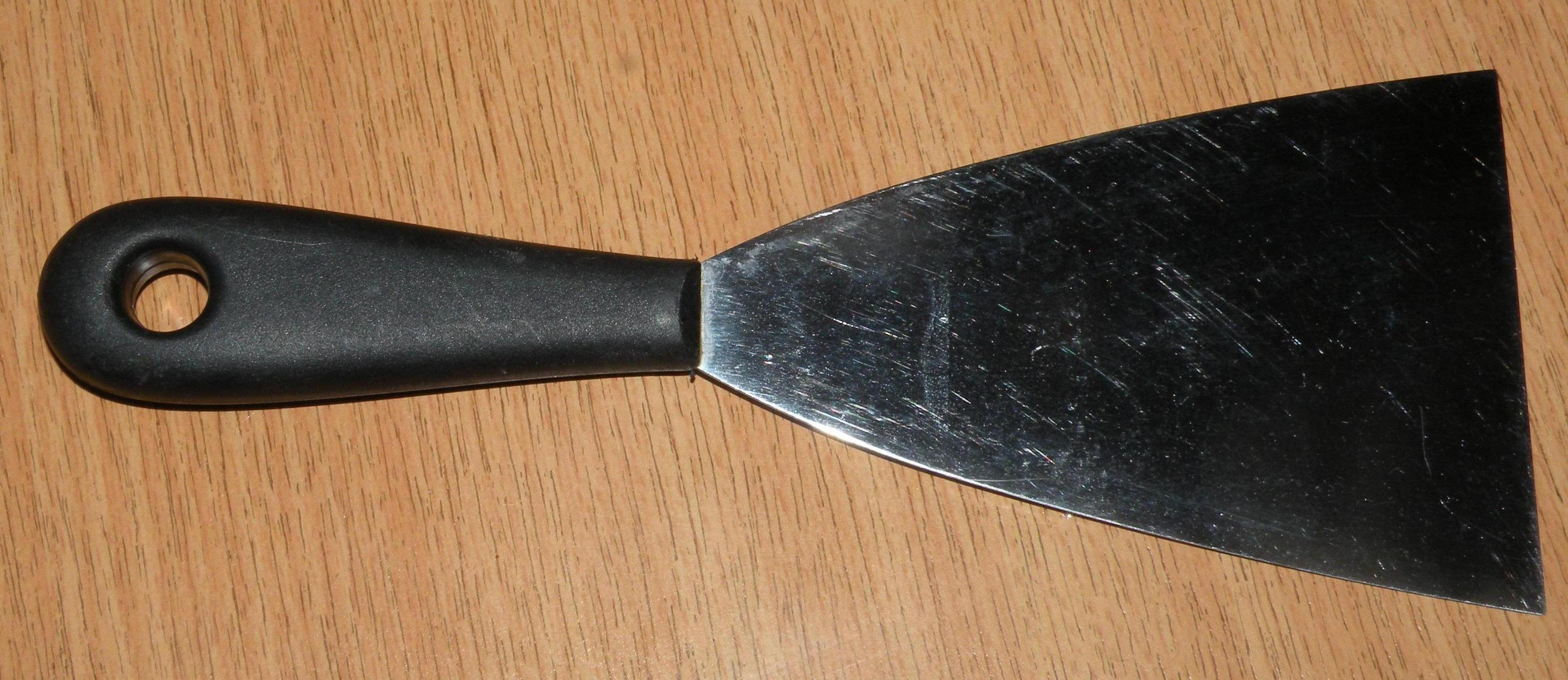 Spatules triangle de cuisine